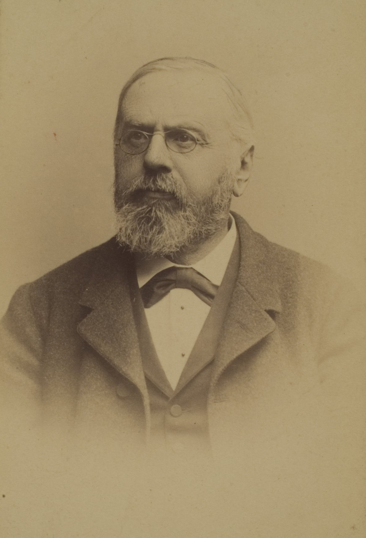 August Adolf Eisenlohr, Ägyptologe, Philologe, 1882–1885 Professor in Heidelberg, seit 1885 Honorarprofessor